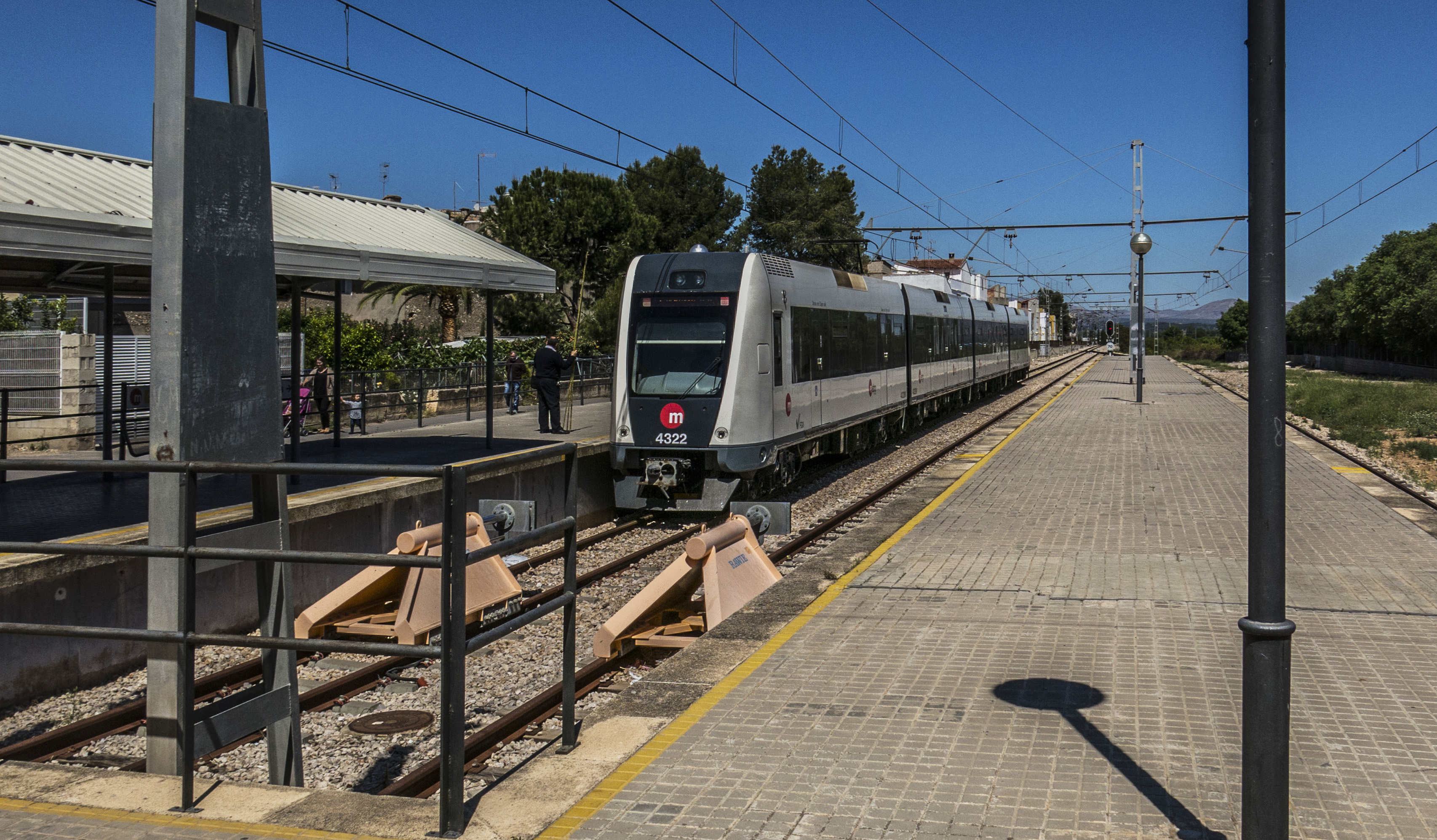 Castelló de la Ribera és un municipi de la Ribera Alta del País Valencià, on arriba la Línia 1 del metro de València. Imatge feta des de l'estació de Castelló de la Ribera.